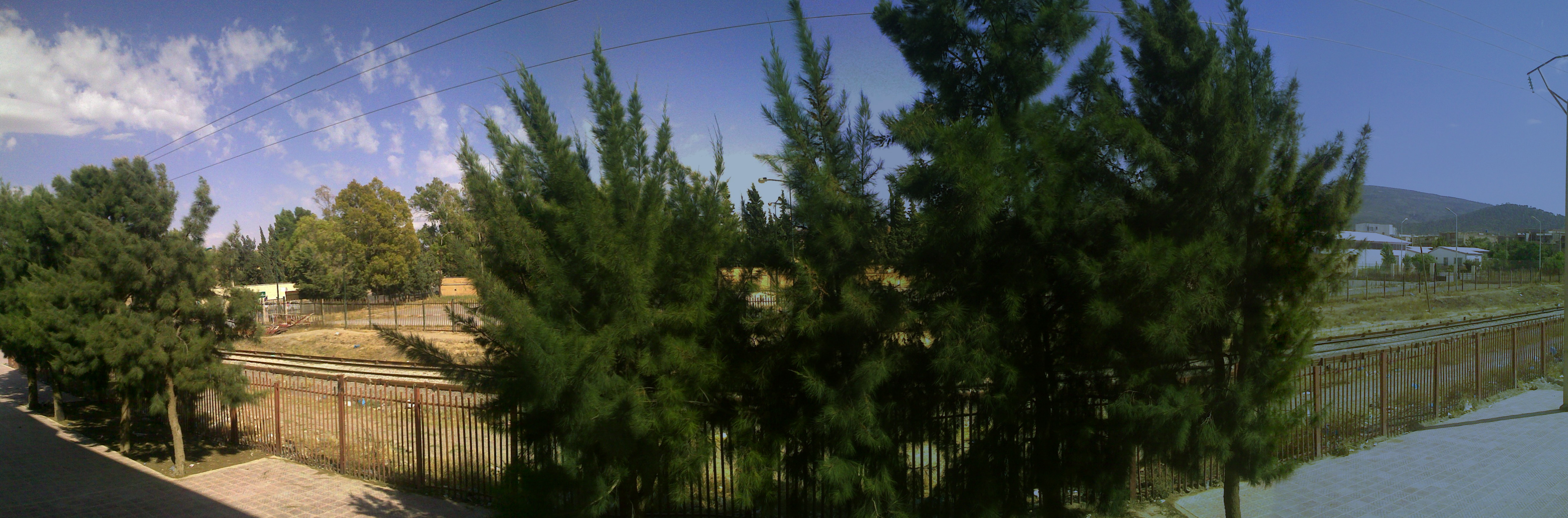 Chemin de fer près du Nouveau complexe à Batna (Algérie)